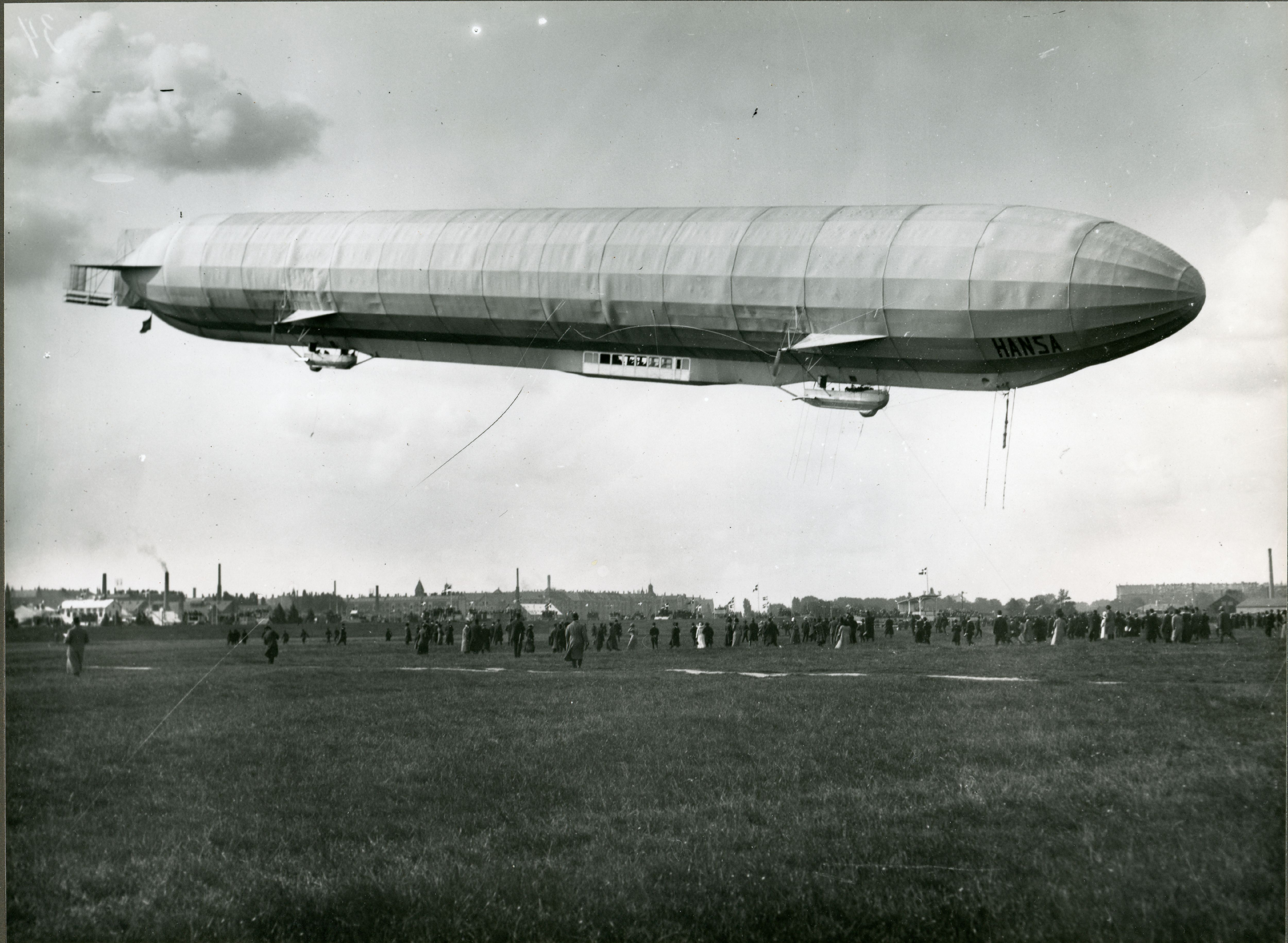 Luftskibet "Hansa" lander på flyvepladsen Aerodromen, d. 19. September 1912. Dansk Aeronautisk Selskab havde sammen med Zeppelinselskabet arrangeret et besøg med landingen af luftskibet "Hansa". Landingen fandt sted på flyvepladsen, hvor titusinder af tilskuere var mødt frem.